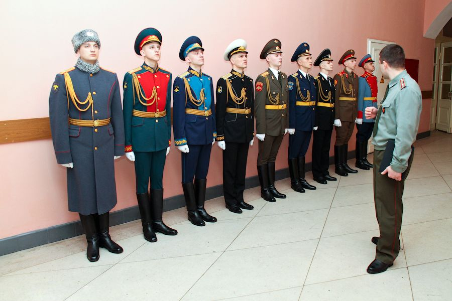 Военнослужащие батальона почетного краула демонстрируют различные образцы униформы